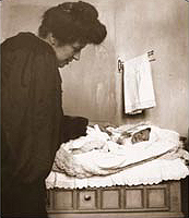 Маргарита Кирилловна Морозова с дочерью Марией